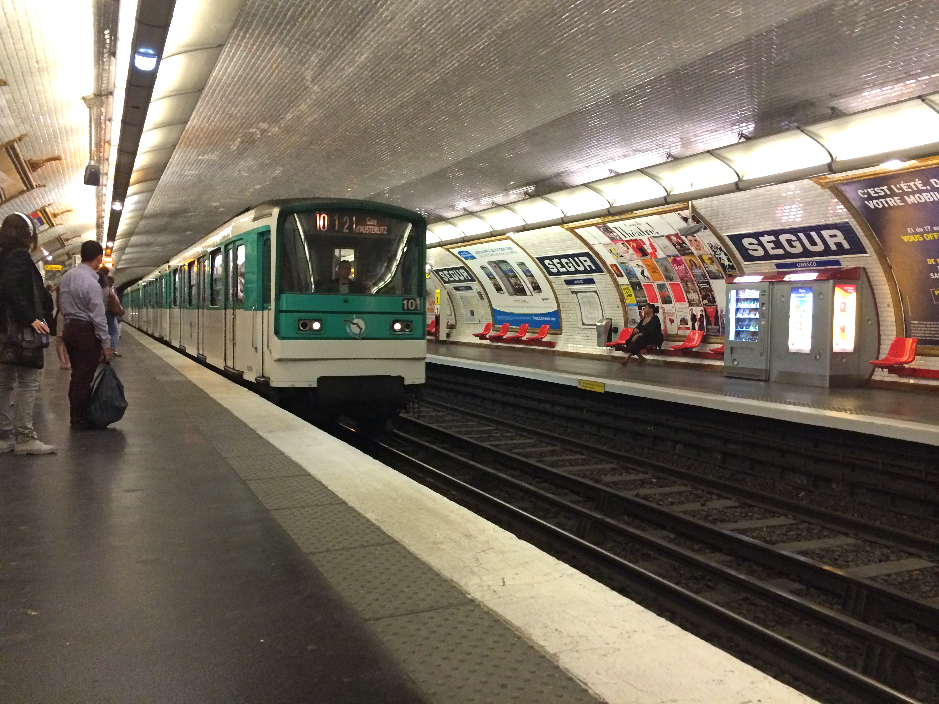 Ségur ligne 10